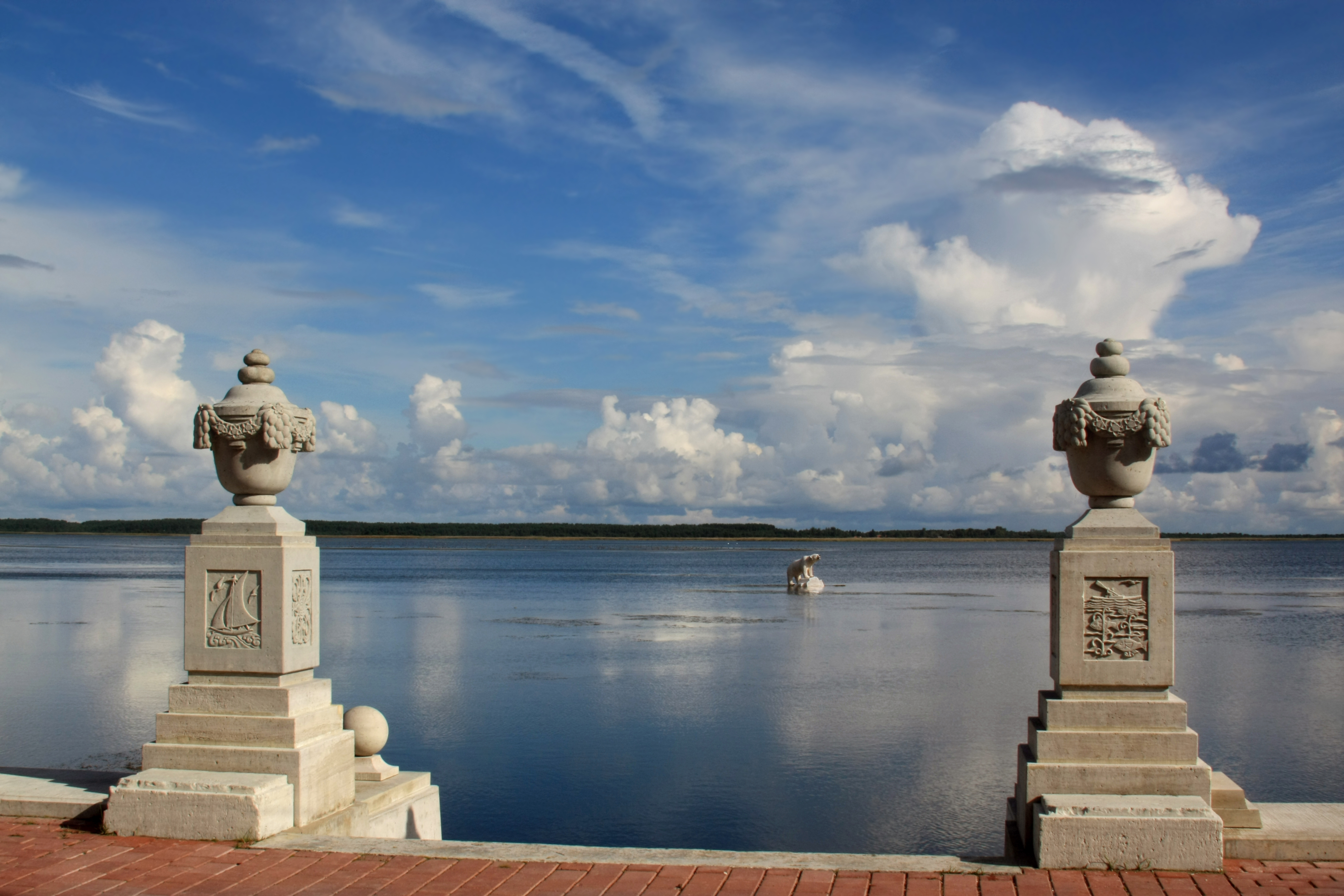 Dekoratiivsed postamentid.Skulptor Roman Haavamägi